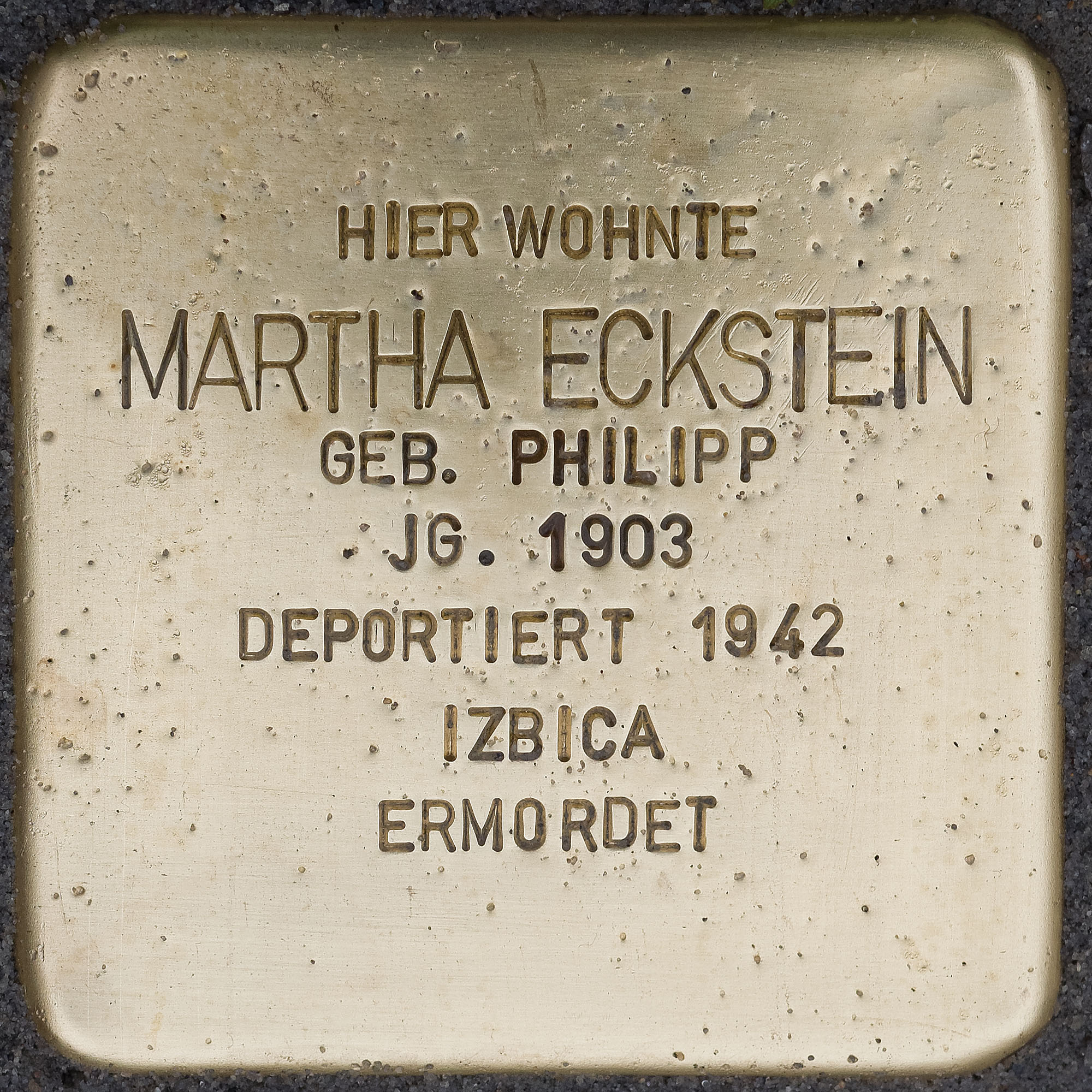 Stolpersteine Suechteln: Eckstein, Martha